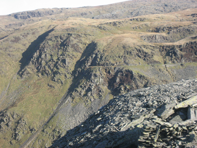 Rhosydd quarry tramway